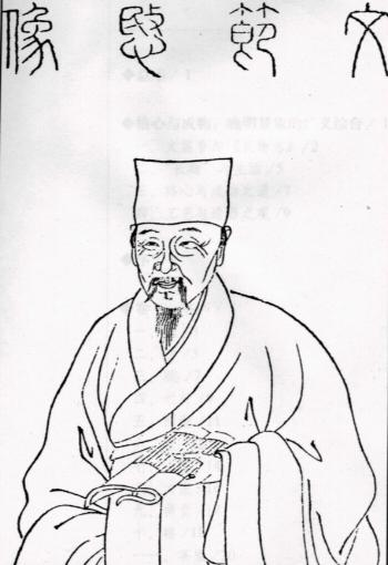 粵語: 明朝人文震亨，字啟美，諡節愍。